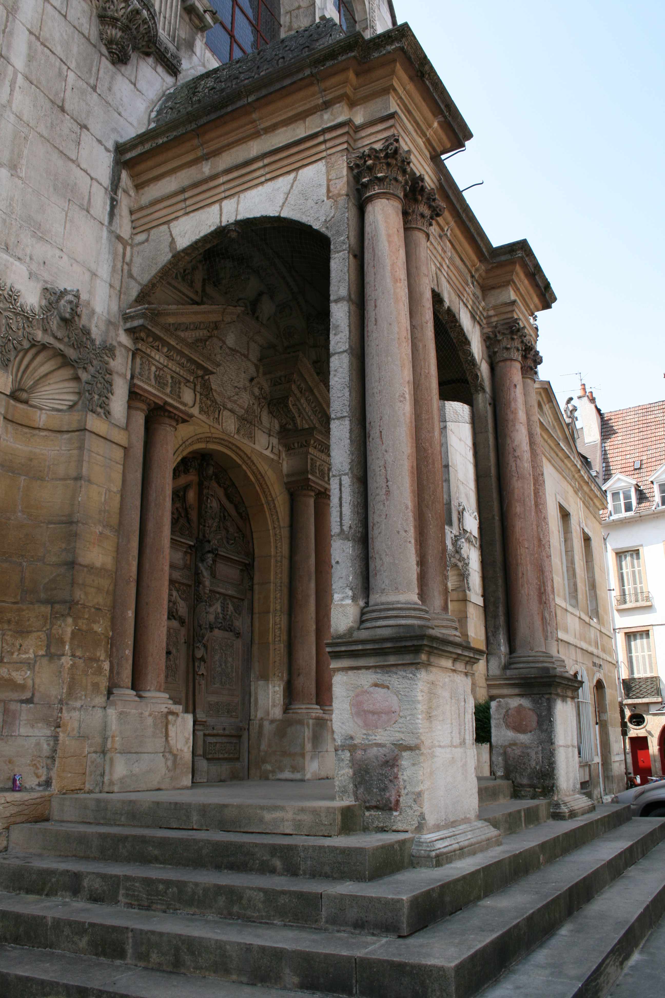 Entrée Parlement Dijon